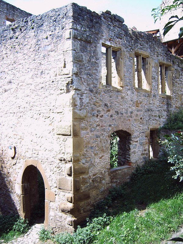 Von Conz Schott um 1510 errichteter Palas auf Burg Hornberg. Ein Vorgängerbau wurde hierzu abgerissen um Platz zu schaffen.